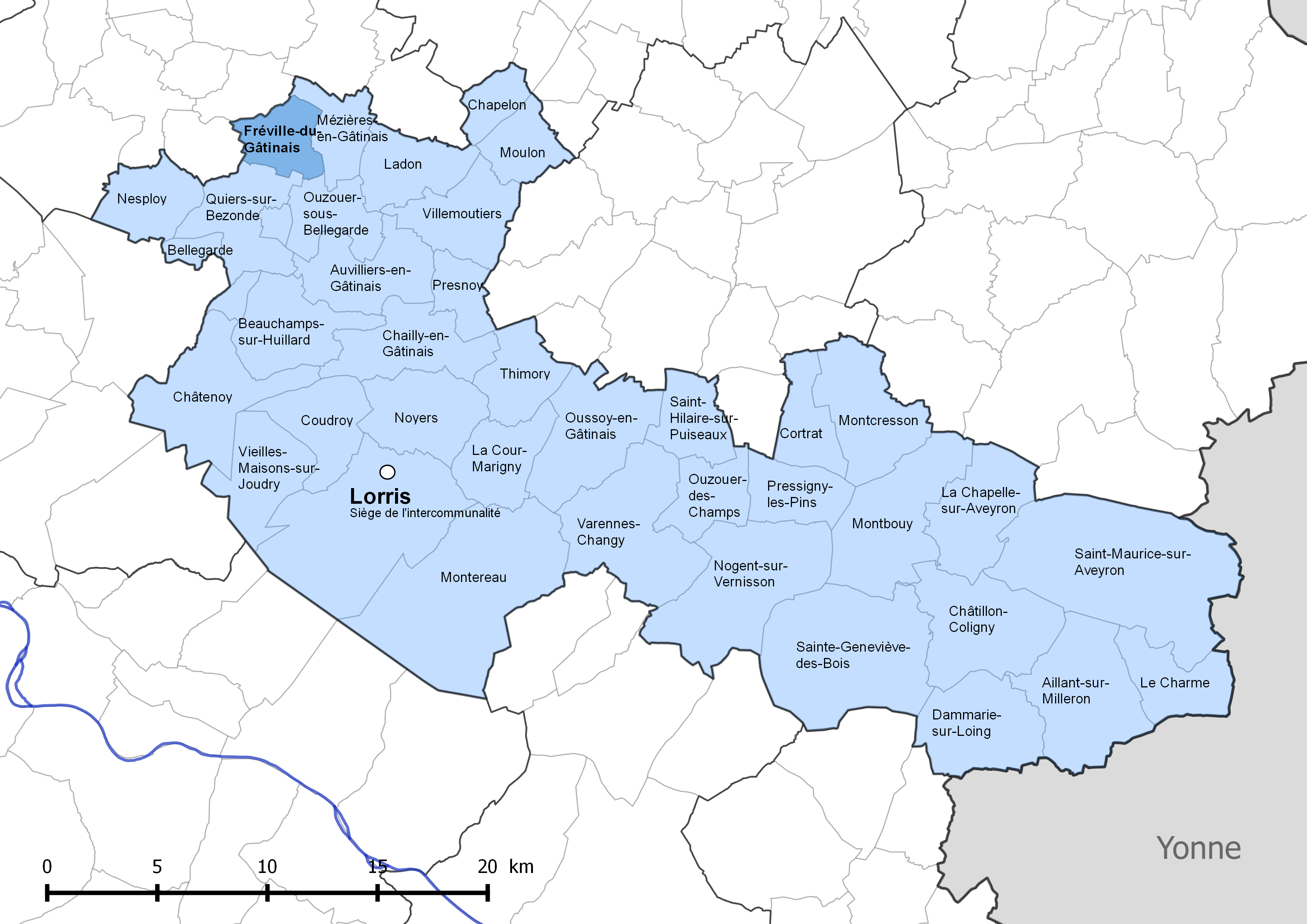 Périmètre de la communauté de communes Canaux et forêts en Gâtinais - Situation de la commune de Fréville-du-Gâtinais.